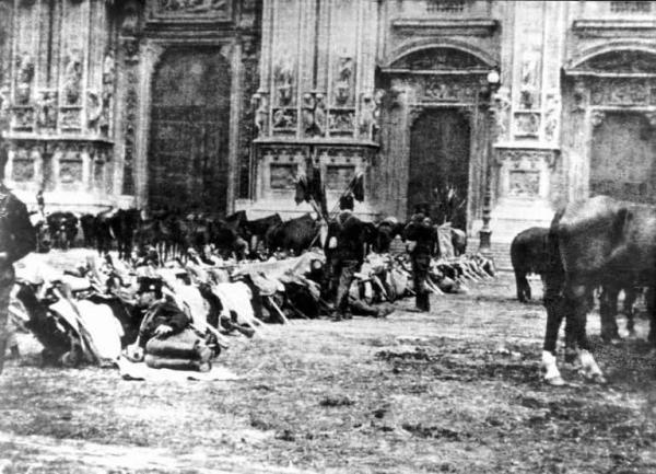 Moti di Milano del 1898, detti anche "Protesta dello stomaco", piazza del Duomo presidiata